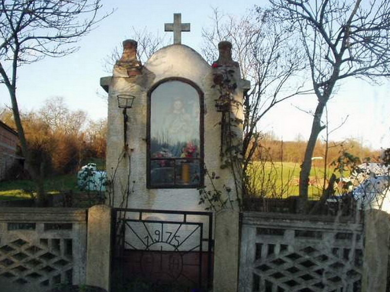 Žabnjak - Chapel